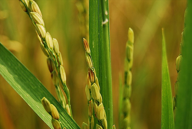 Rice grains